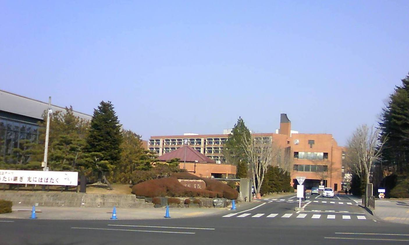 学校法人宮城学院 Miyagi Gakuin Universiy. Sendai, Japan